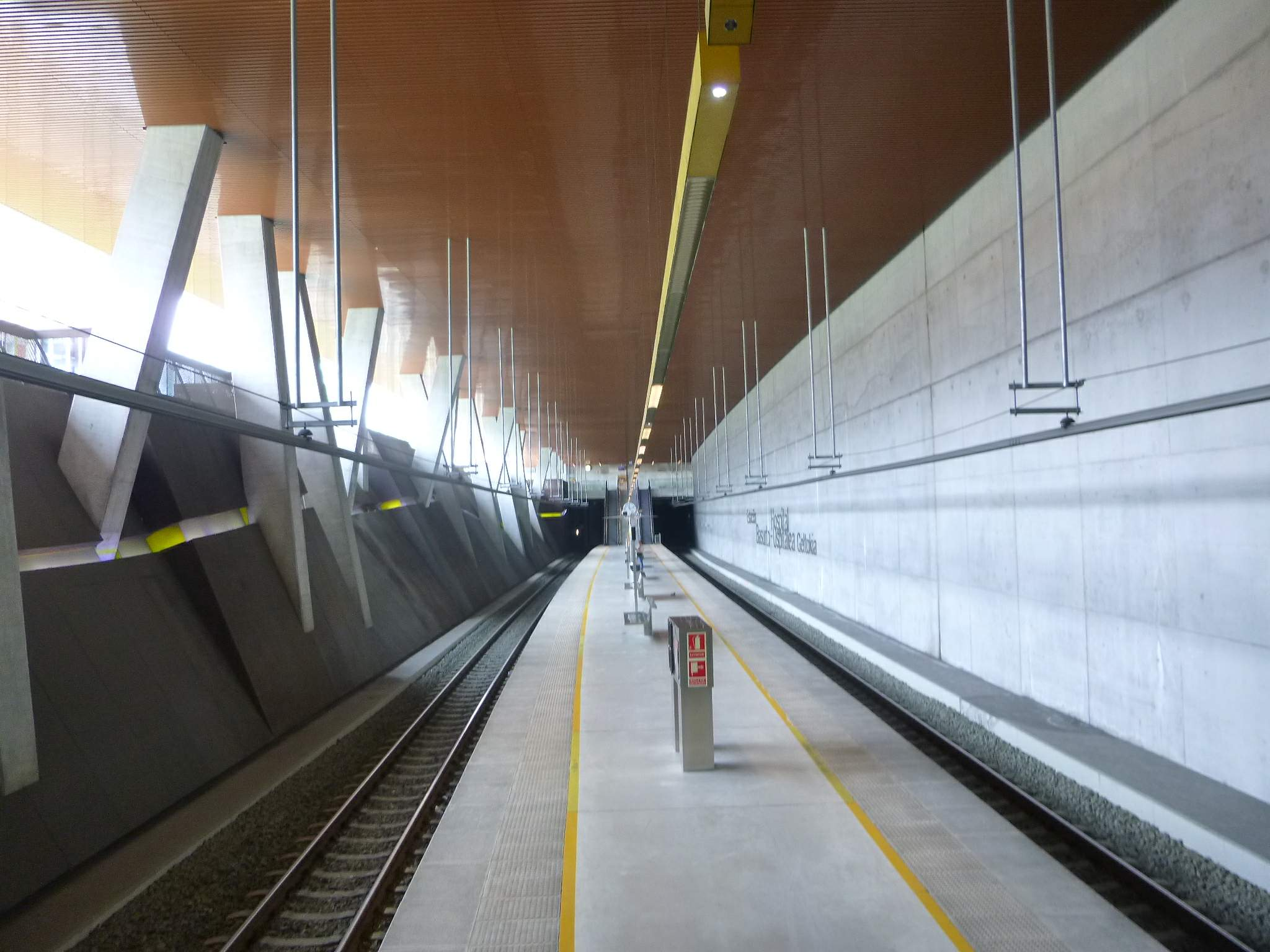 Estación de Basurto-Hospital, de FEVE (Bilbao)